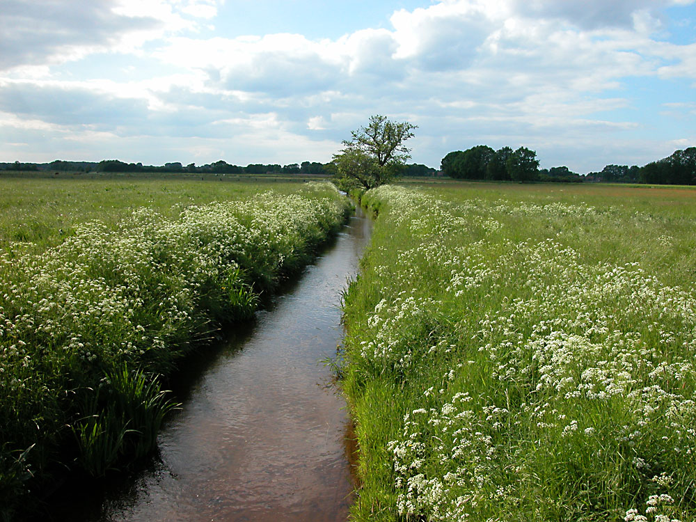 Die Wiesen des Dorsten-Rhade